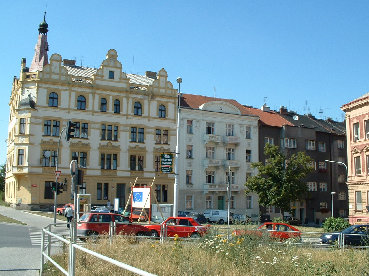 Domy v Křížkově ulici, Plzeň-Roudná. Oranžová budova vpravo je 17. ZŠ. Asi 50 metrů vlevo od místa fotografie je nyní Kaufland.